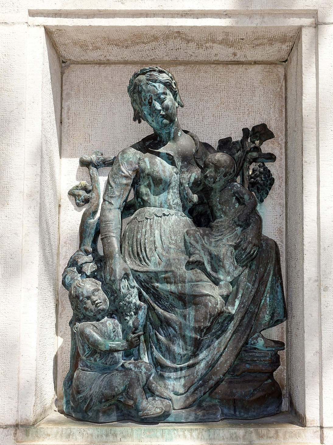 Gustav von Bunge (1844–1929) Brunnen Skulptur. Künstler unbekannt. Standort. Universitäts-Kinderspital Basel